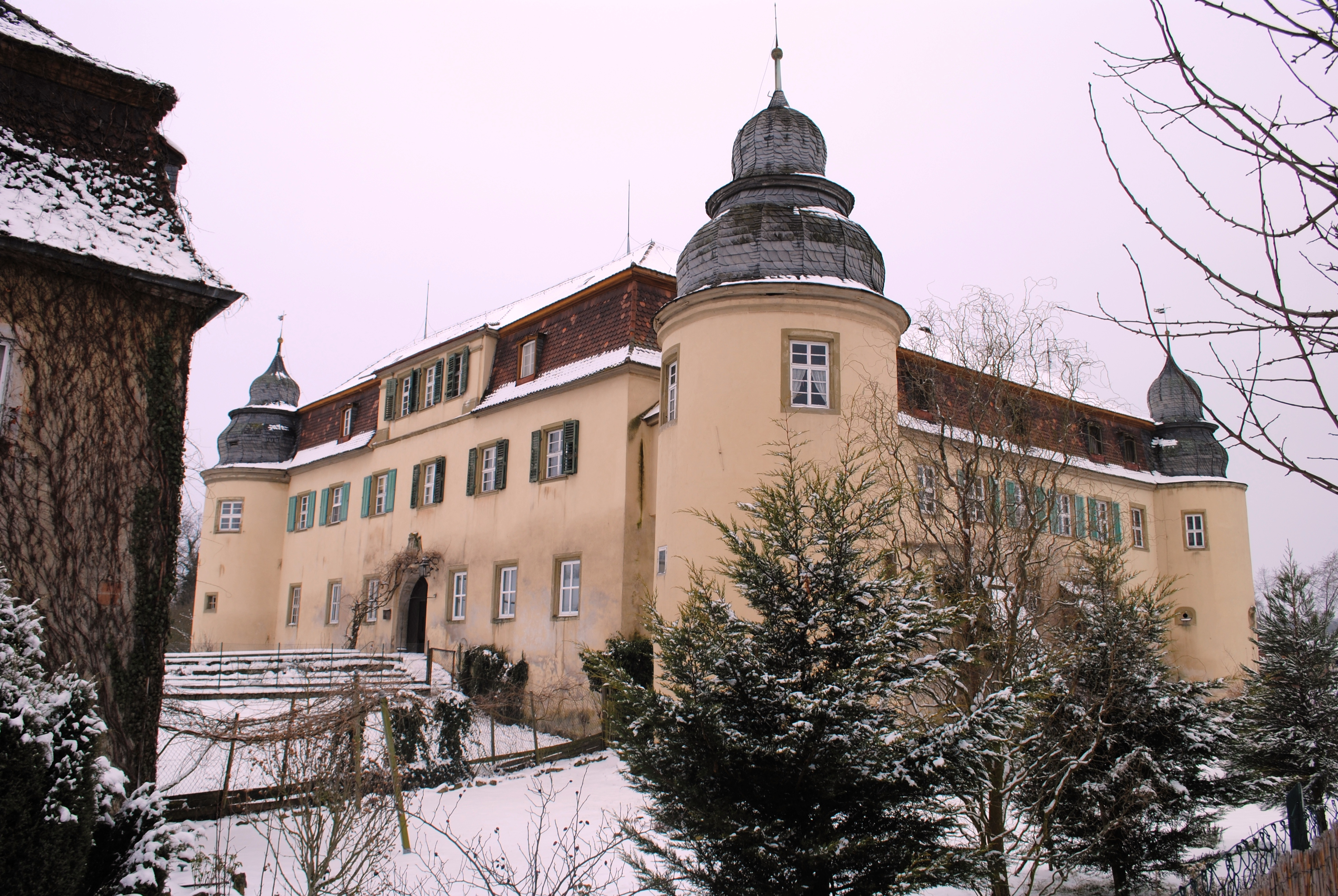 Fröhstockheim, Kirchplatz 6, Schloss der Freiherren von Crailsheim, Vierflügelanlage aus zweigeschossigen Mansarddachbauten mit Ecktürmen, spätes 16. Jahrhundert, Dächer 18. Jahrhundert; D-6-75-161-20